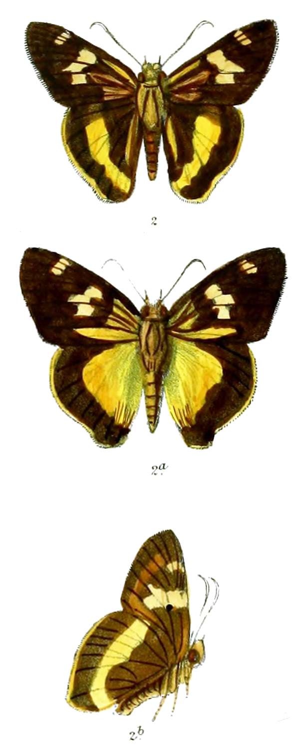 Parata chuza= Hasora schoenherr chuza (male, female, male underside)